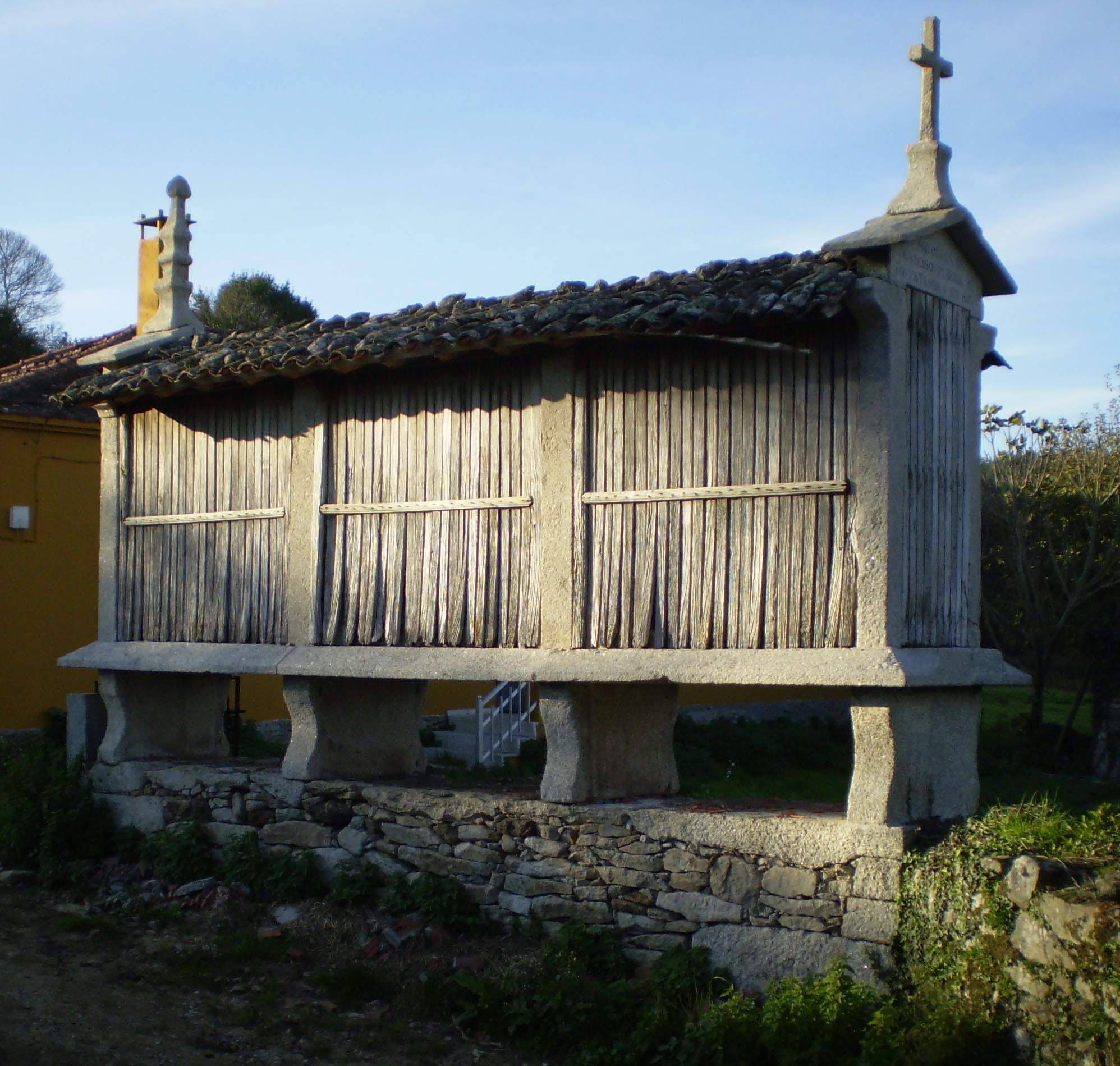 Hórreo tipo mahía, de tres claros, sobre soleira e catro cepas. Coroado con cruz latina e lampión. Ubicando no lugar de Vilasante (Antas de Ulla)